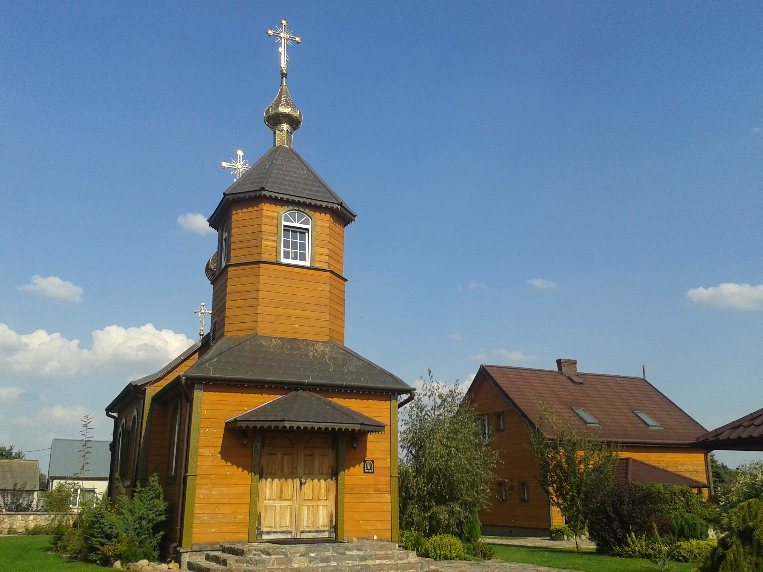 Monaster św. Serafina z Sarowa w Kostomłotach - cerkiew i budynek mieszkalny dla mnichów